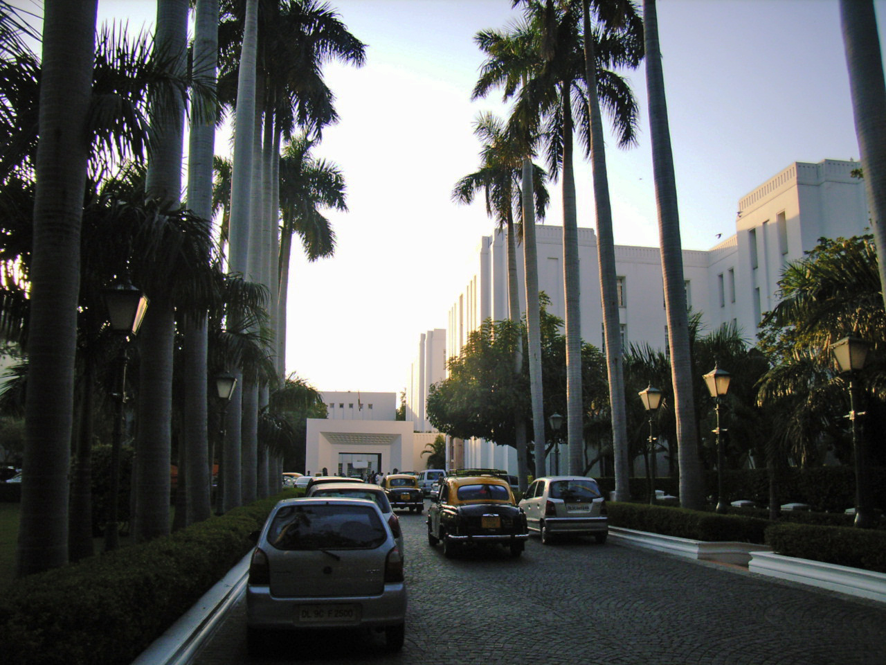 Imperial Hotel, New Delhi